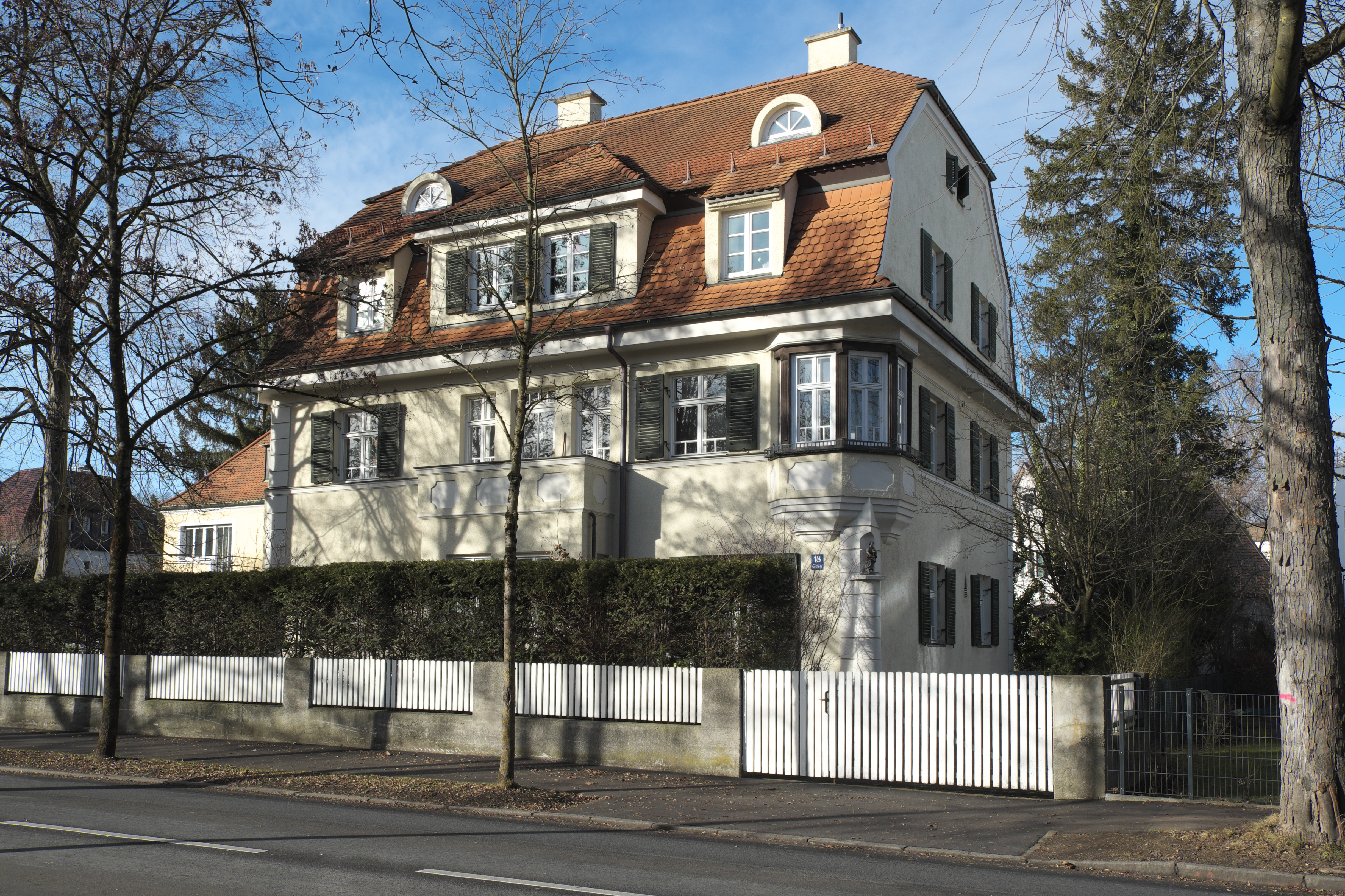 Villa in der Maria-Eich-Straße 18 in Pasing im Stadtbezirk Pasing-Obermenzing in München (Bayern/Deutschland)